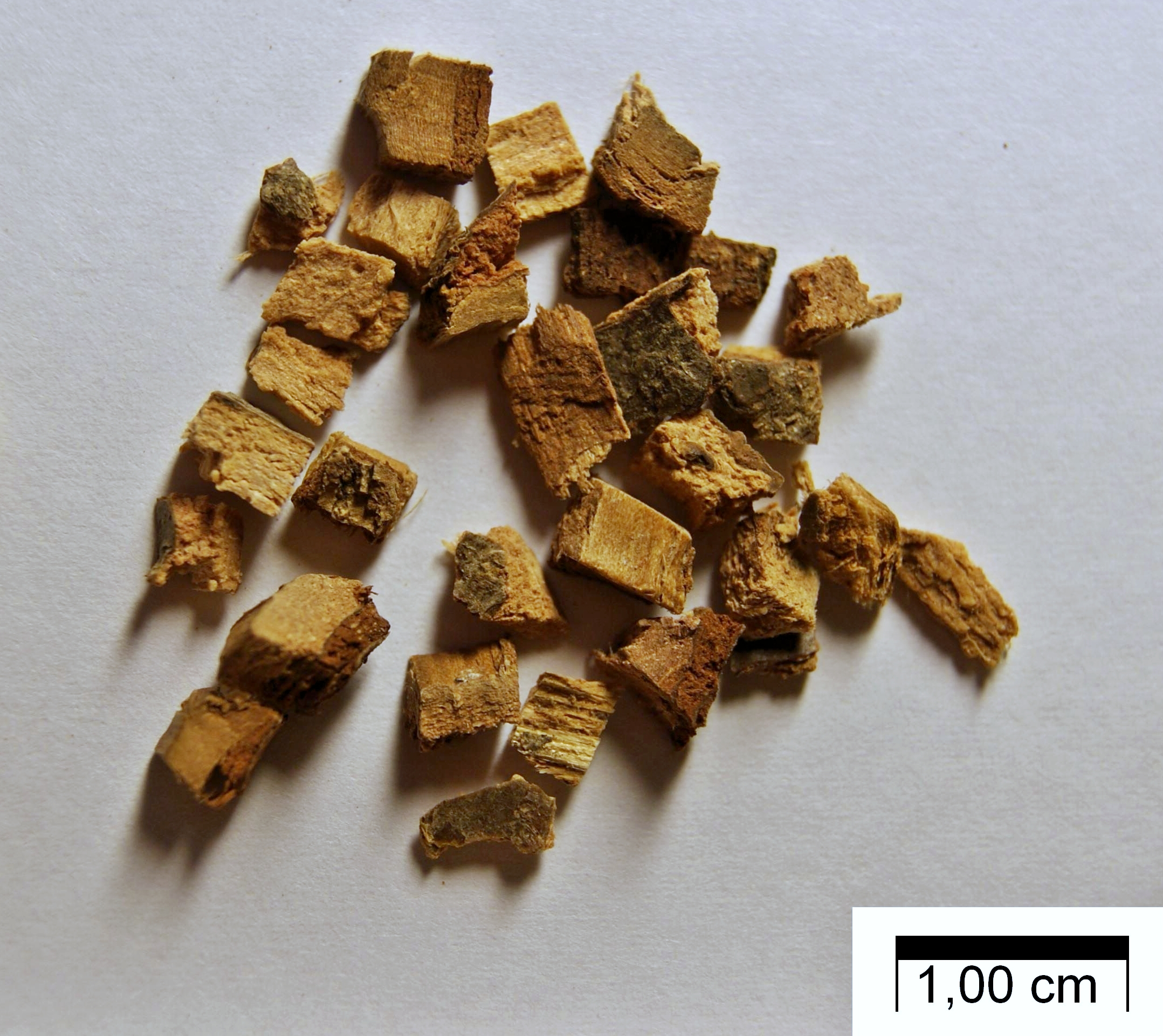 Eichenrinde (geschnitten), Cortex Quercus conc.